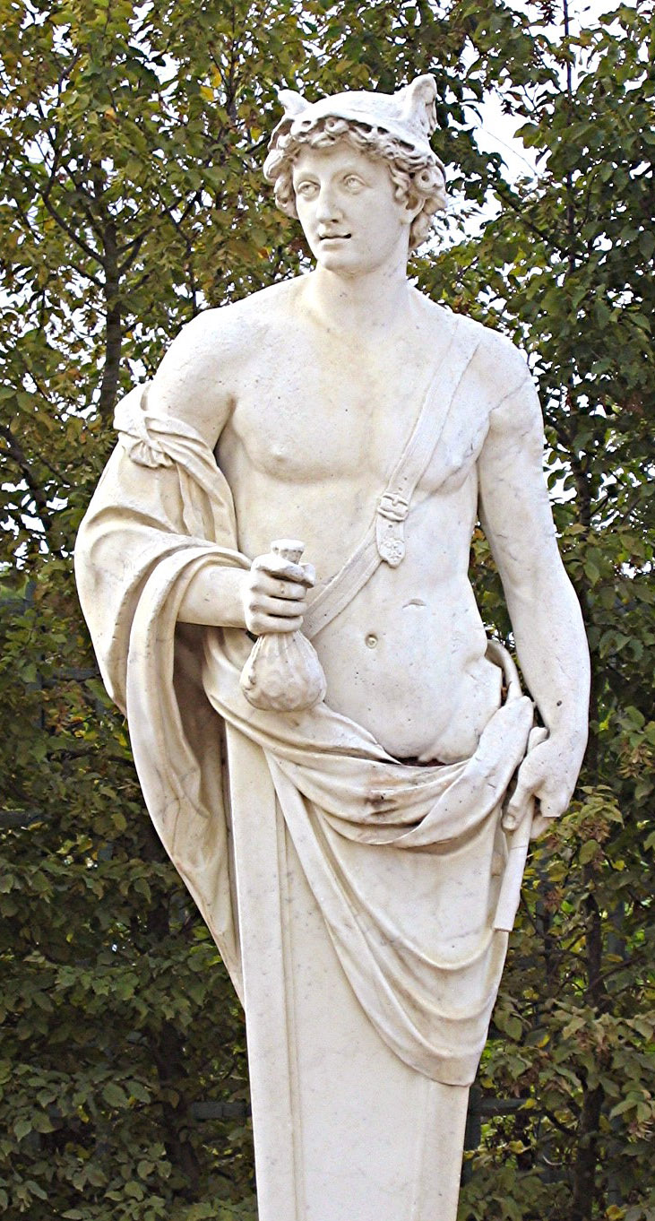 Sujet:Hermes-Statu am Park vum Versailler Schlass Source;Eege Foto vum Utilisateur:Urban